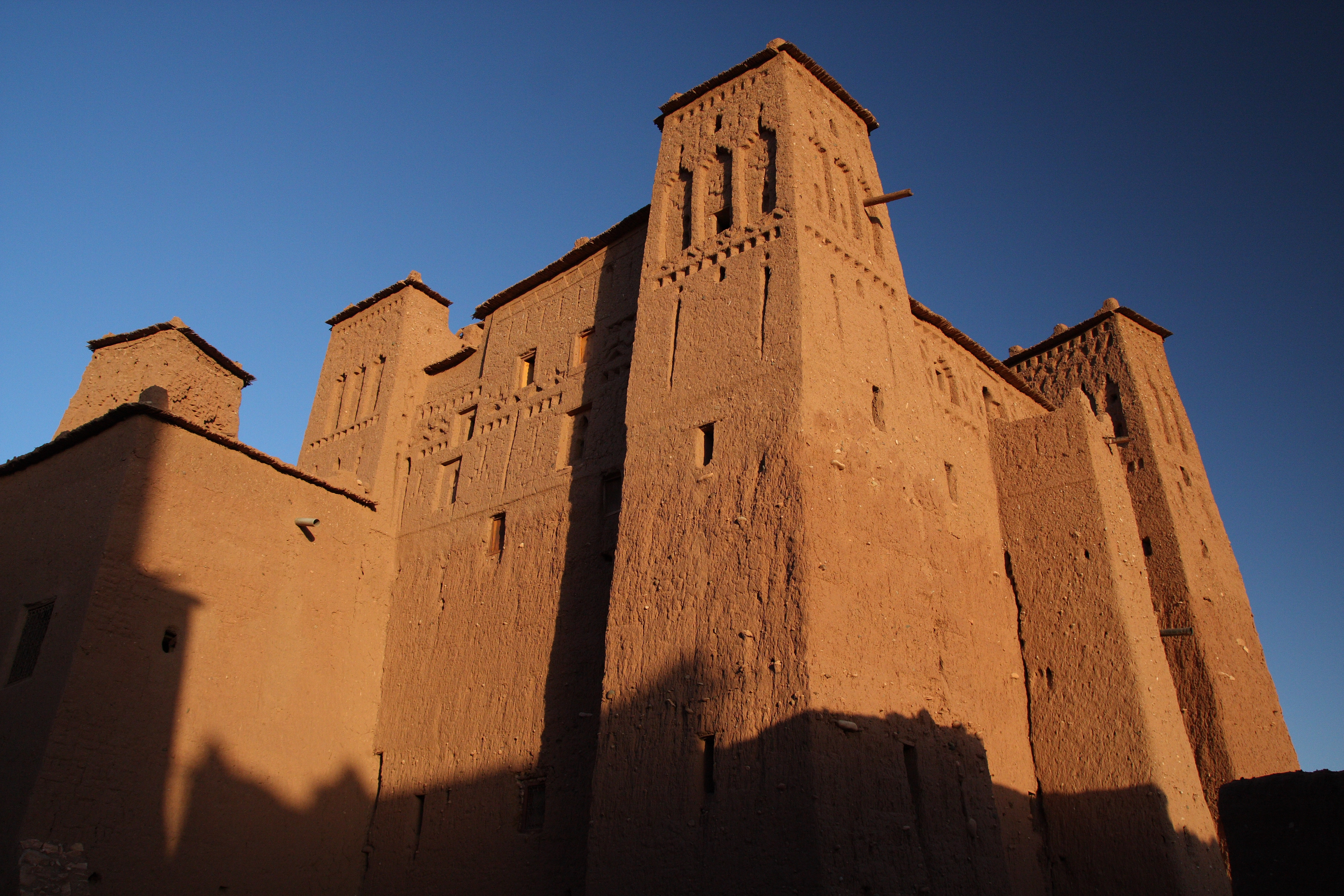 Ait Benhaddou, Morocco